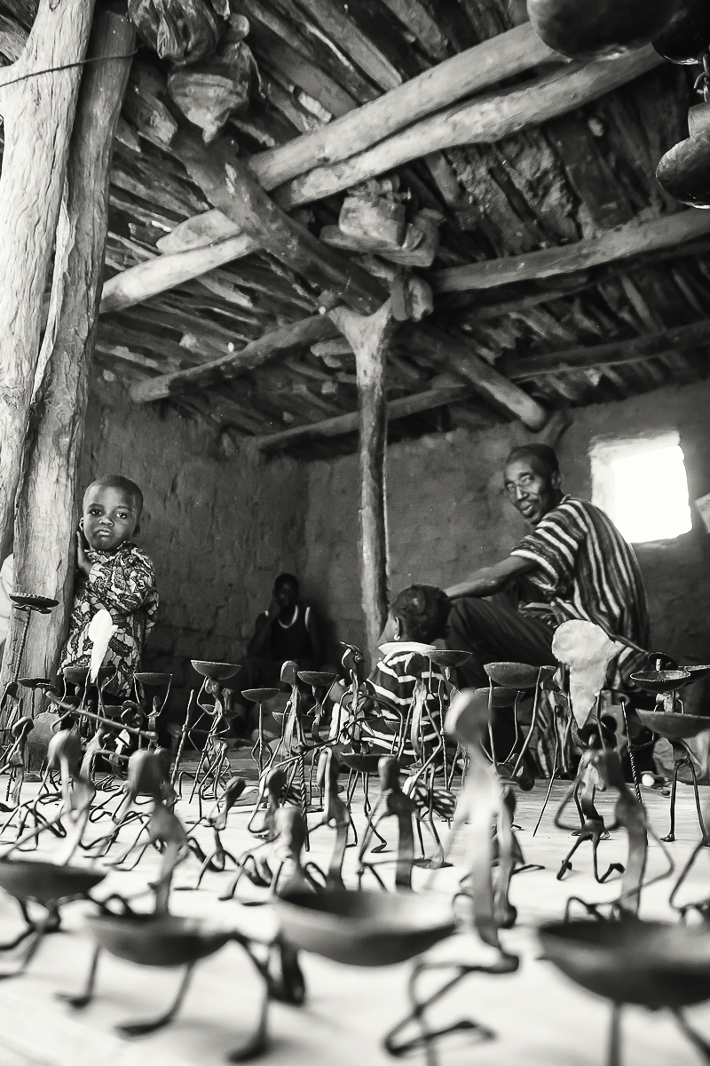 Vieil artisan du fer , dans la ville de Bobo Dioulasso, Burkina Faso This is an image of "African people at work" from Burkina Faso